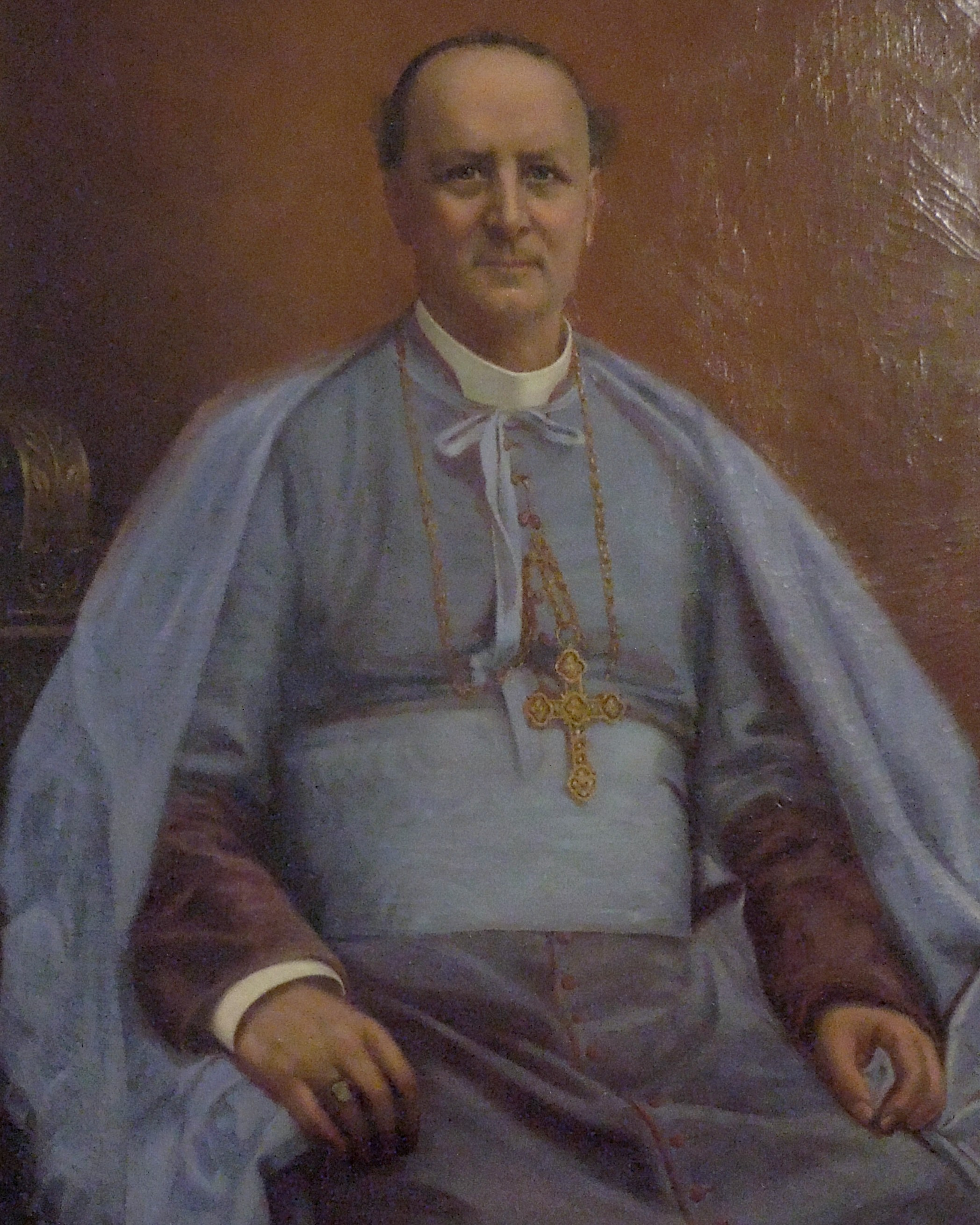 Nîmes (Gard, France), évêché, portrait par Louis Emile Pinel de Grandchamp de Mgr Félix-Auguste Béguinot (vers 1900), évêque de Nîmes de 1896 à 1921.